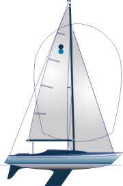 International 806, Ott Yacht GmbH, mit freundlicher Genehmigung